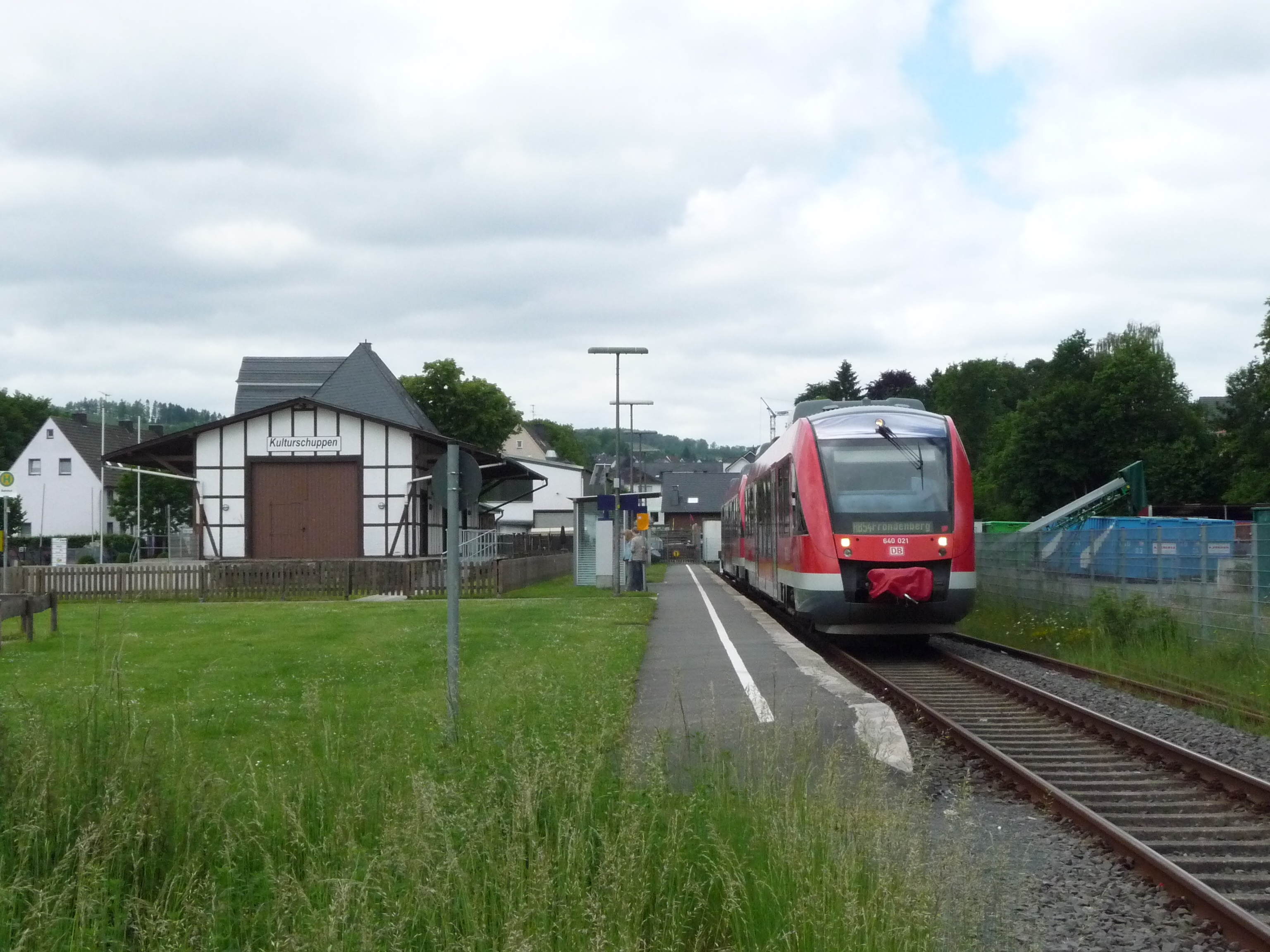 640 021 wartet mit 640 030 am 13.06.2010 in Neuenrade auf die Abfahrt als RB 29458 nach Fröndenberg